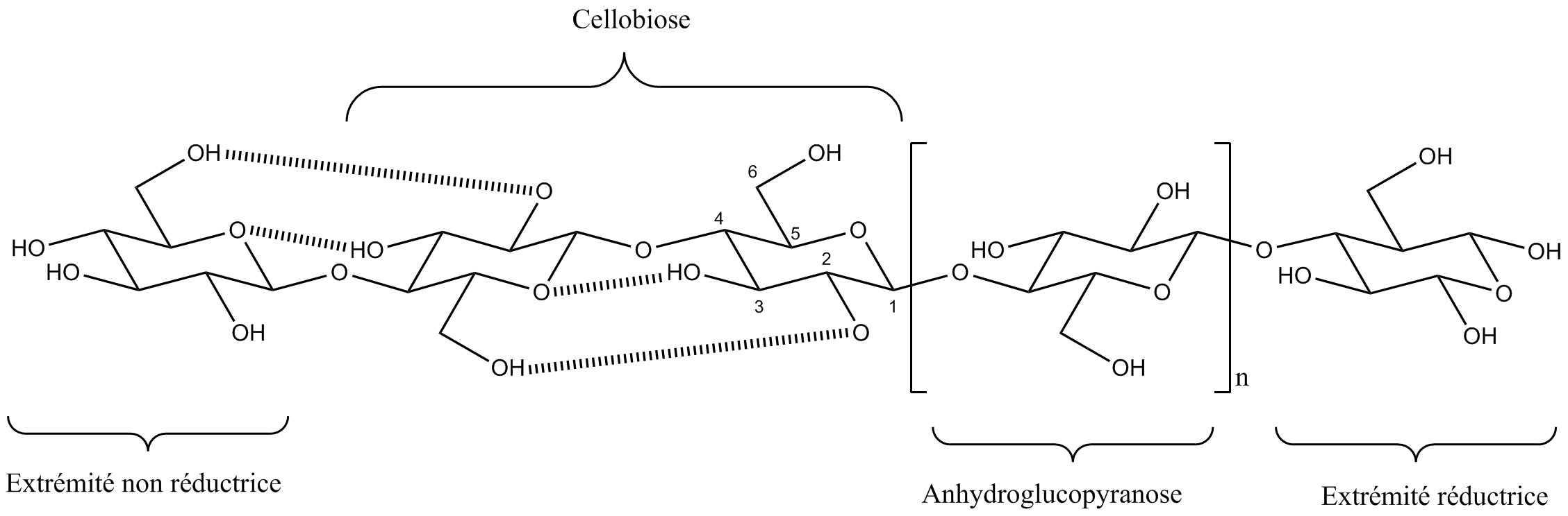 Structure de la cellulose Je suis l'auteur de ce schéma.